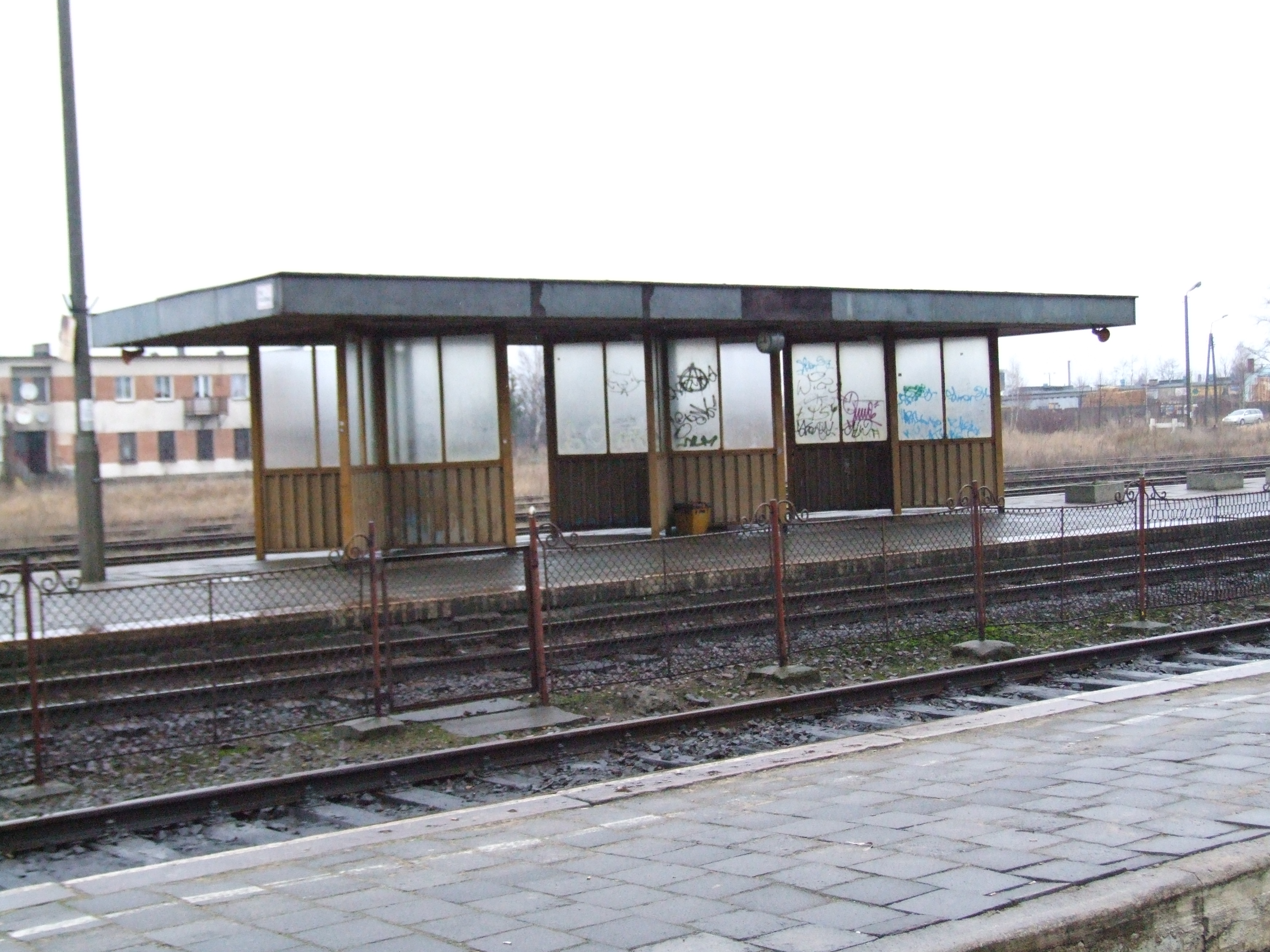 Czersk (dworzec kolejowy)